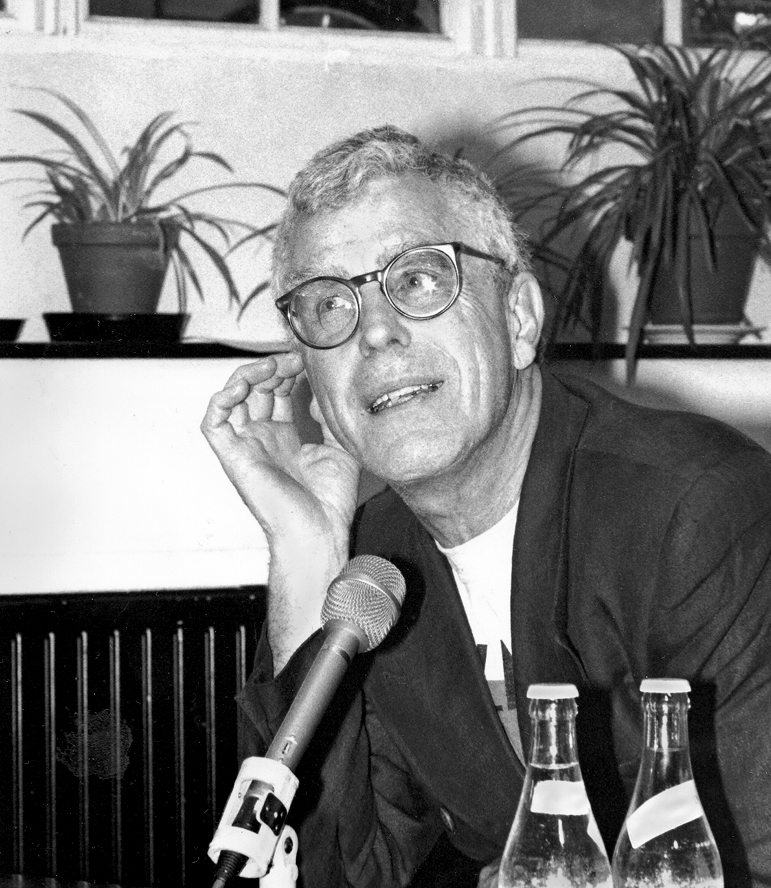 Bo Widerberg intervjuas under Malmö Filmfestival 1990.